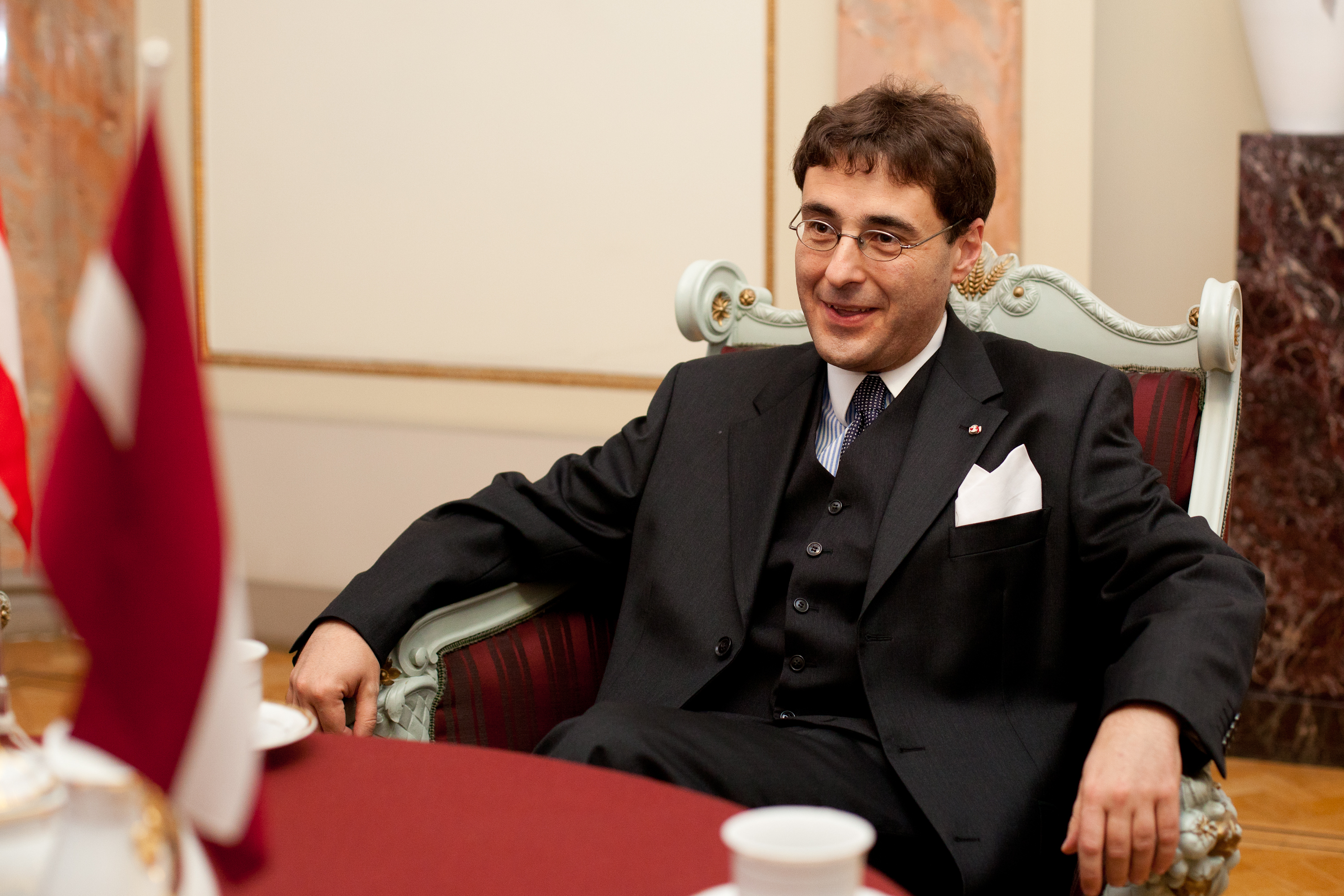 Austrijas ārkārtējais un pilnvarotais vēstnieks Latvijā Dr. Štefans Pēringers